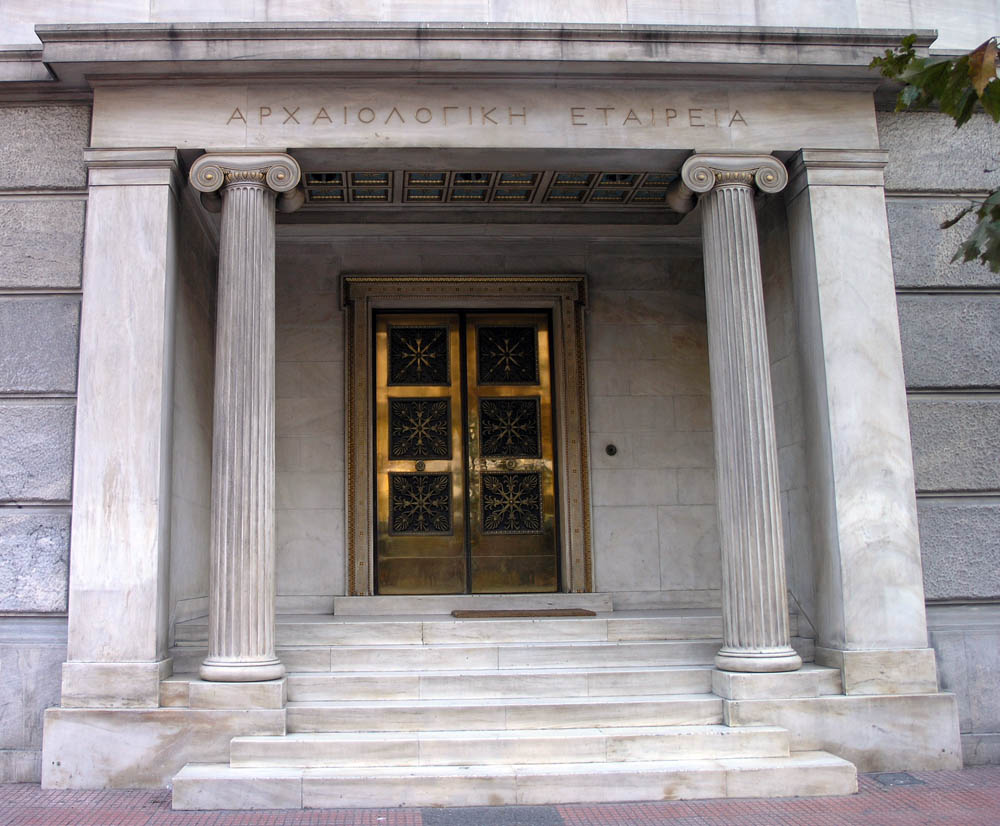 Façade (porte d'entrée) de la Société archéologique d'Athènes, 22 Panepistimiou (Athènes).